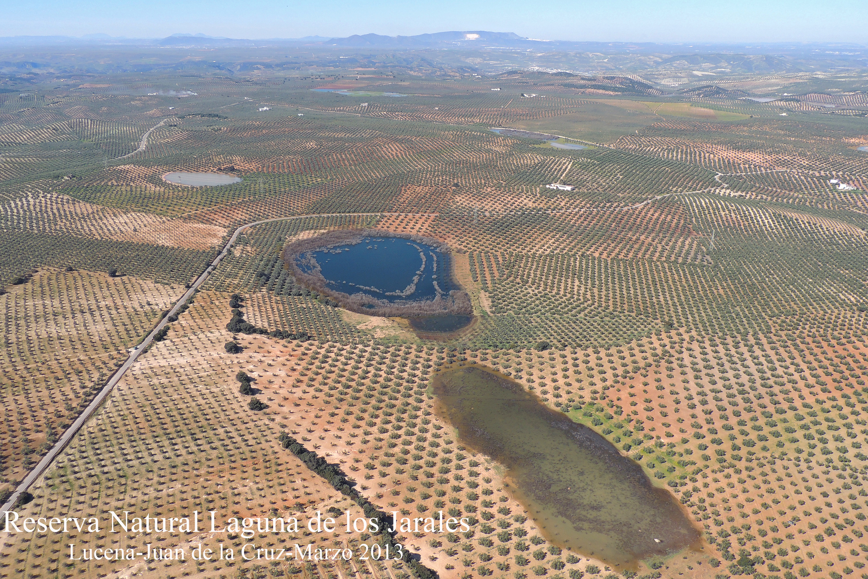 Complejo lagunar de Los Jarales, Molina Ramírez, Remendado, etc.